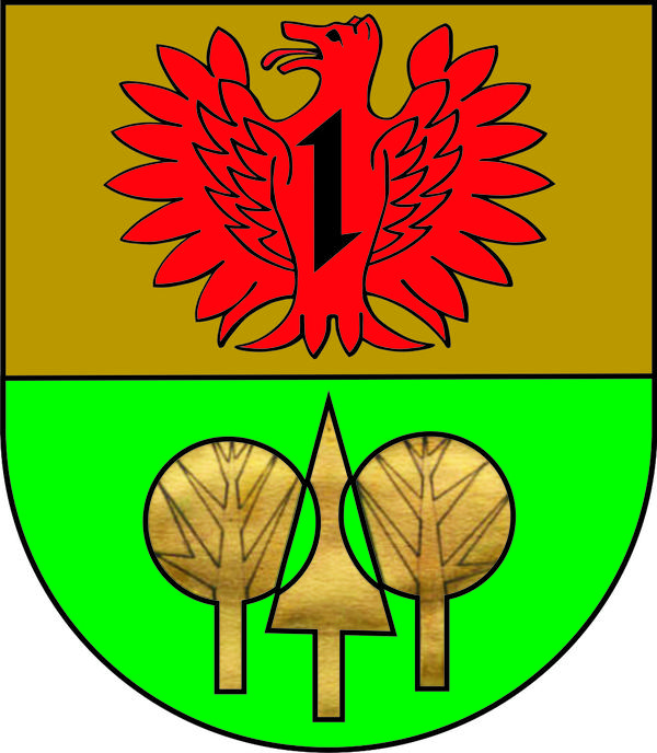 Wappen von Bollenbach